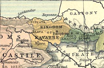 Koninkrijk Navarra - public domain (zie